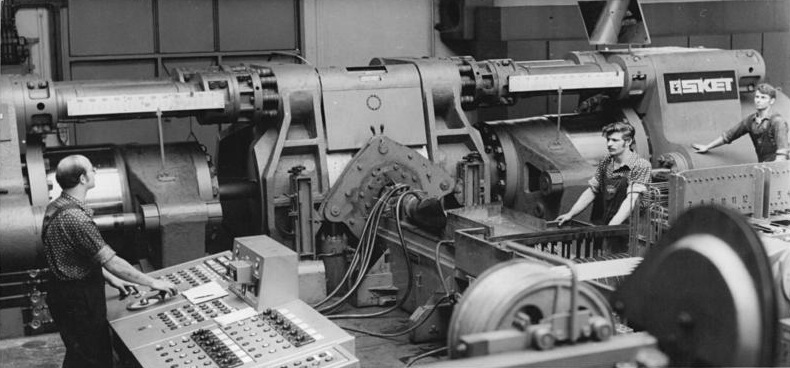 Zentralbild Brüggmann 16.4.70 Berlin: Hochmoderne Technologie im KWO - Kampf um Titel "W.I.Lenin" Vom 20. Jahrestag der DDR bis gegen Ende März 1970 erprobte eine Jugendbrigade - 23 Arbeiter aus verschiedenen Betriebsabteilungen des Kombinates VEB Kabelwerk Oberspree - eine im VEB Schwermaschinenbaukombinat "Ernst Thälmann" Magdeburg hergestellte Anlage zur Herstellung von Aluminiumdraht. Bei der Anlage handelt es sich um ein hochmodernes technologisches Verfahren. Die Erprobung wurde erfolgreich beendet. - Zu Ehren des 100. Geburtstages des Begründers des Sowjetstaates kämpft die Brigade aus dem Kabelkombinat um den Titel "W.I. Lenin". - Ekkehard Gronert (l) bedient vom Steuerpult die Doppelstempelpresse.